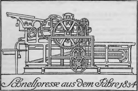 BGT Schnellpresse